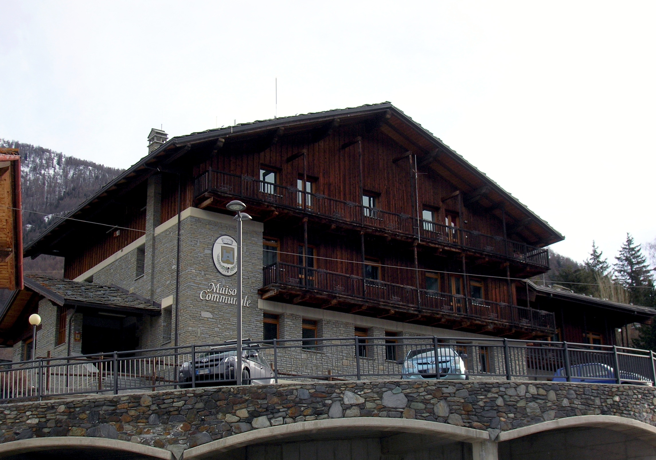 municipio di Etroubles, Valle d'Aosta, Italia.